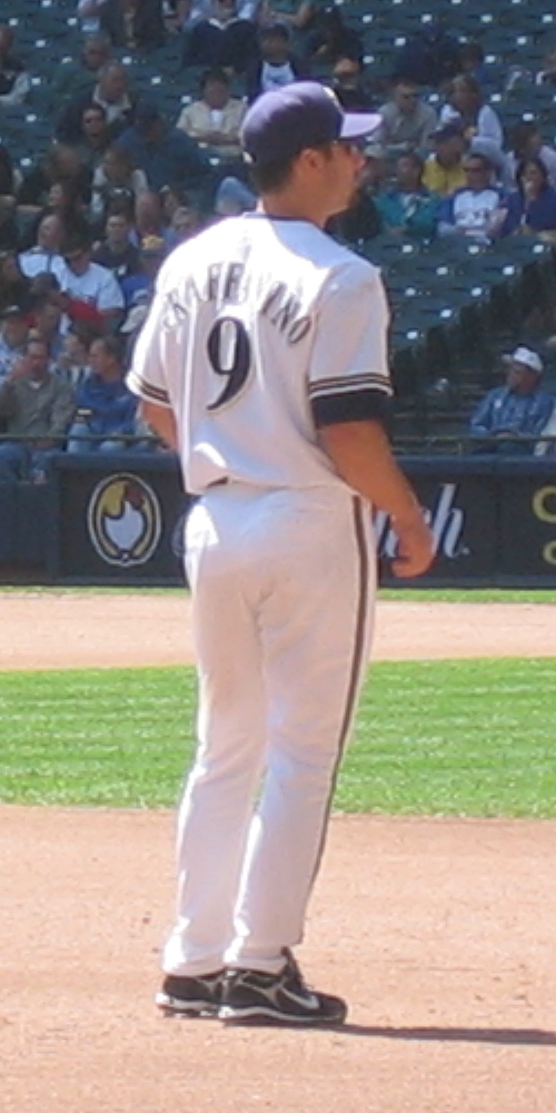 Tony Graffanino